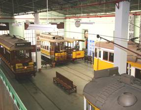 Núcleo 1